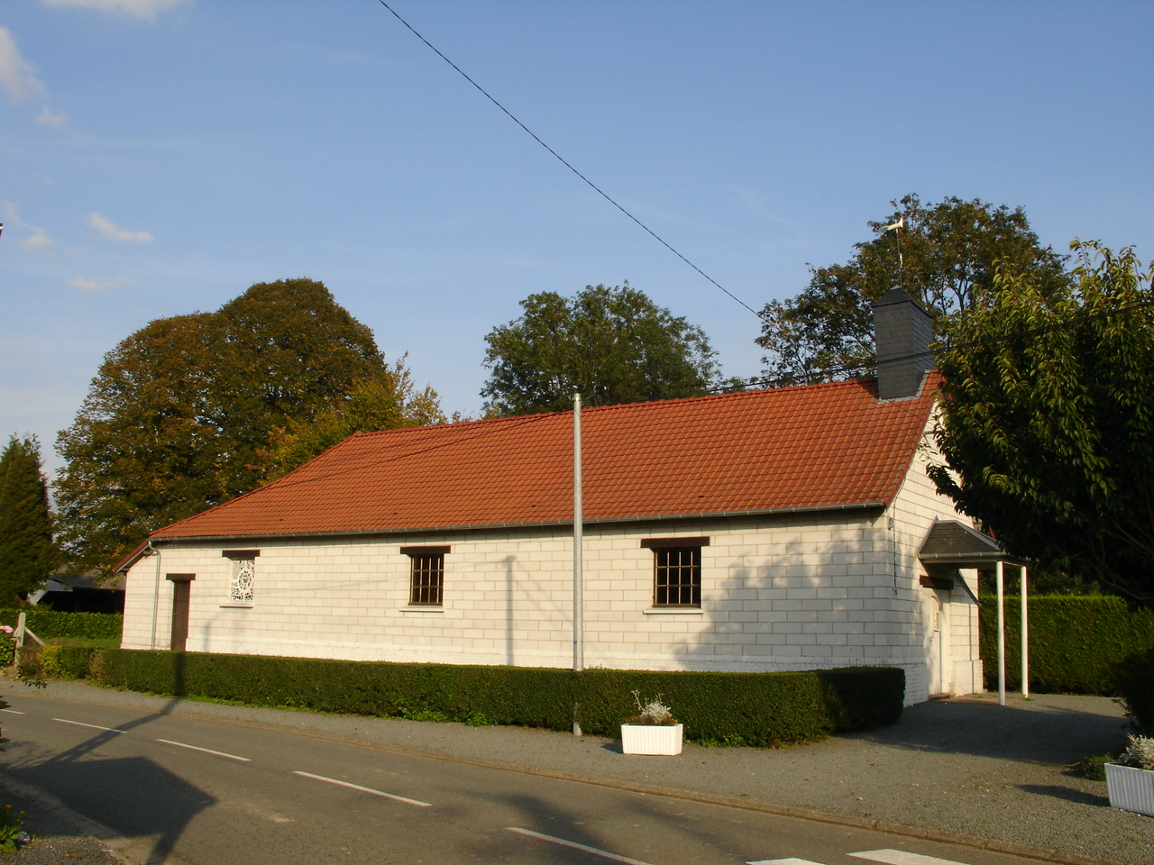 Église de Denier